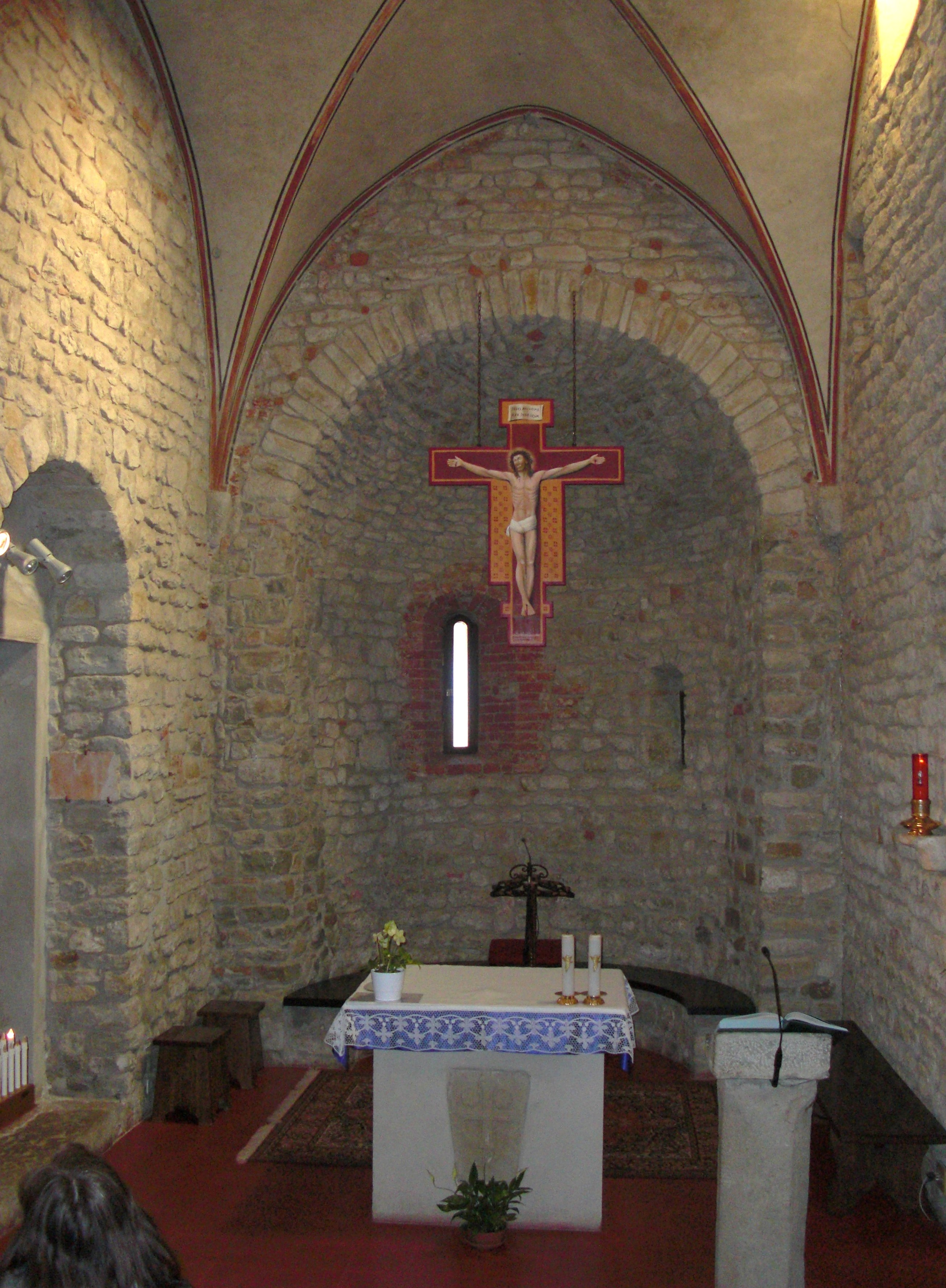 Interno della Chiesa di Santa Maria, la più antica dell'Eremo di Sant'Alberto di Butrio, risalente all'anno 1050, con la Crocifissione, Pala d'Altare olio su tavola, del pittore Giuseppe Frascaroli